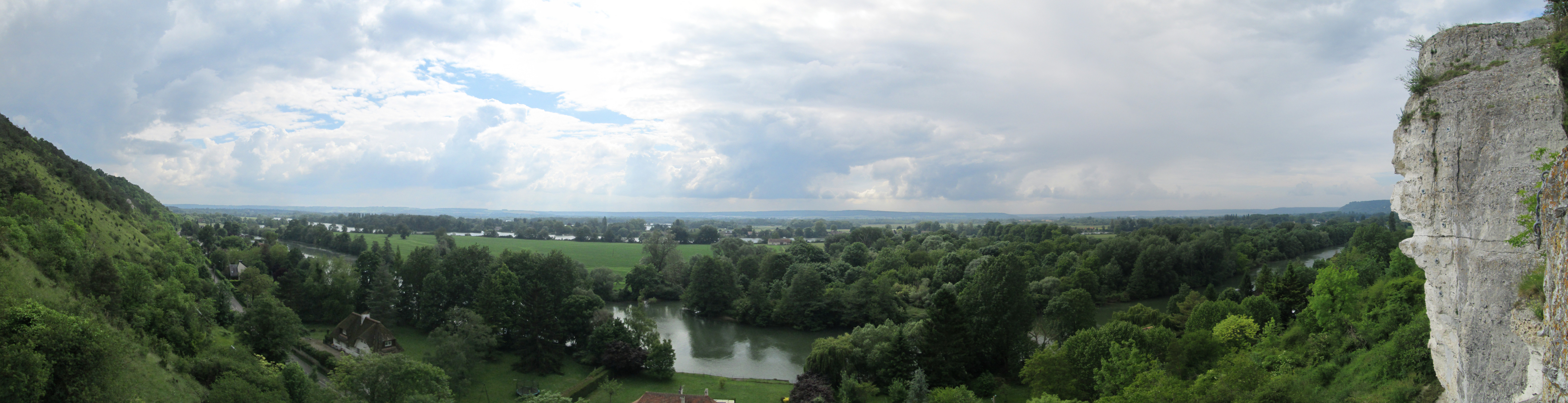 Panorama pris au sommet de la voie "l'asticot".